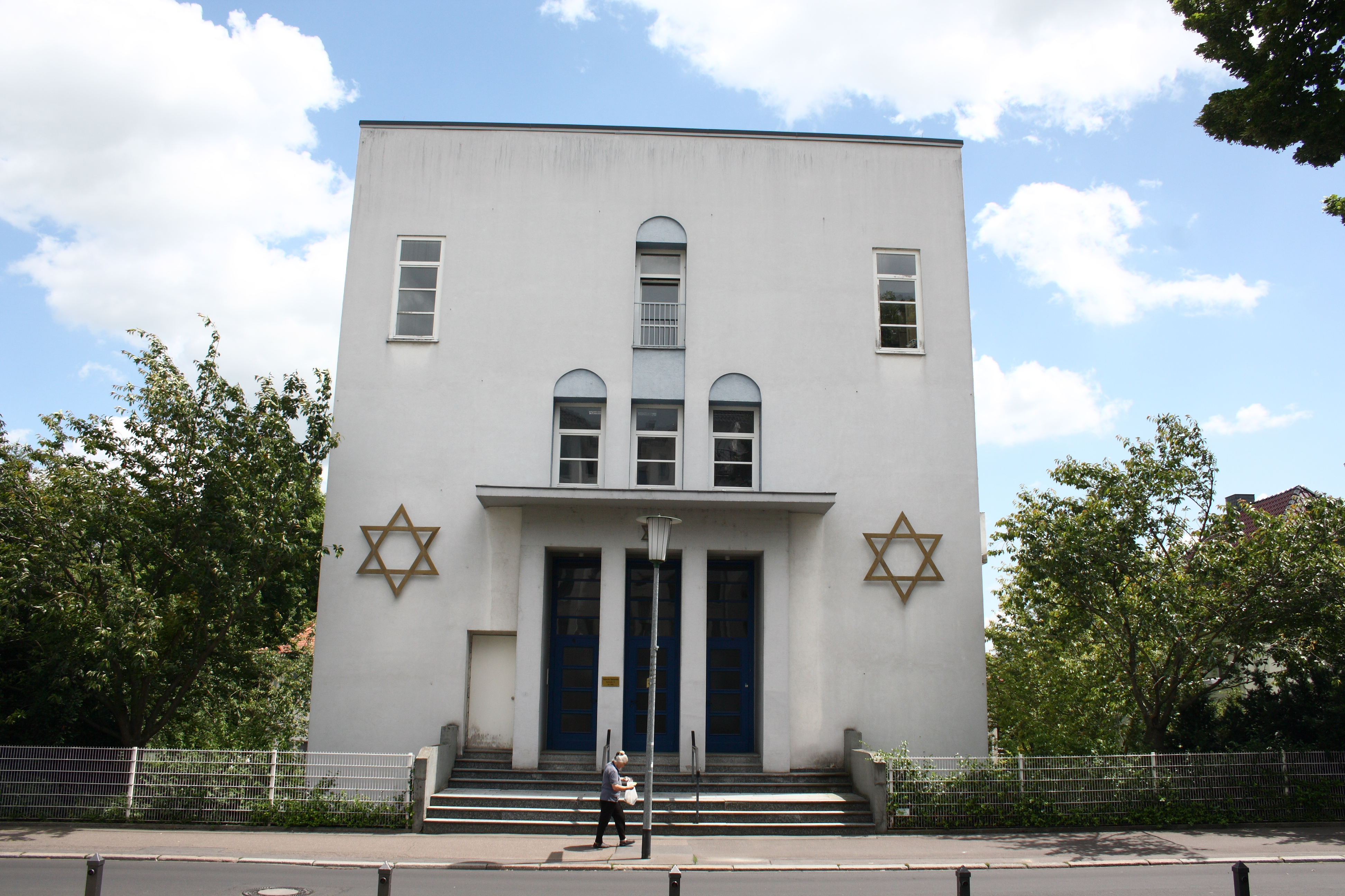 Synagoge in Bad Nauheim im Wetteraukreis (Hessen)